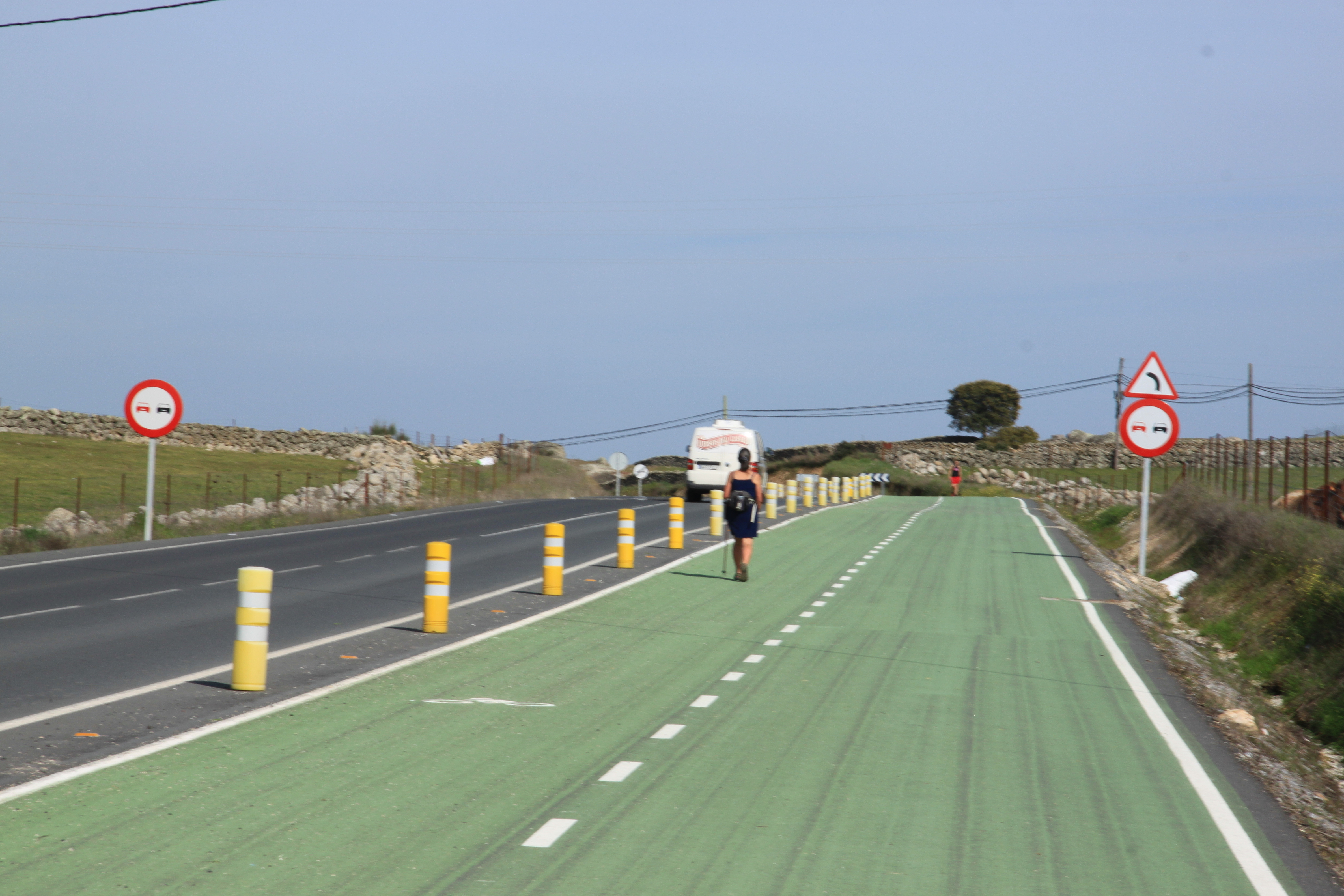 Gente caminando por el carril bici de la carretera CC-100, que une el pueblo de Casar de Cáceres con la carretera nacional 630. Término municipal de Casar de Cáceres, provincia de Cáceres, España.